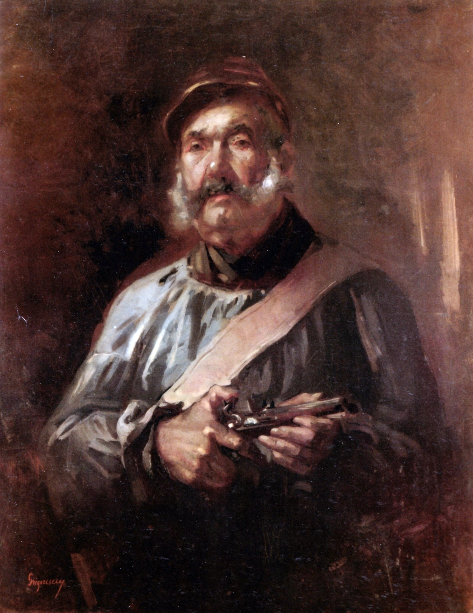 Paznicul de la Chailly, 88.5x69,5cm, ulei pe pânză, Nr. inventar. 69596/7536, Ordin de clasare 2052/07.02.2006 - Tezaur - la Muzeul Național de Artă al României. Acest tablou a figurat la Expoziţia Universală de la Paris din 1867 sub titlul "Chasseur dans les bois". Prezent la expoziţia Societăţii Amicilor Bellelor Arte din 1873, tabloul a fost cumpărat de Stat şi a intrat în Pinacotecă sub titlul de La Chailly. Paznicul este reprezentat sub trăsăturile unui bărbat în vârstă, cu favoriţi, caschetă de vânătoare, îmbrăcat cu o bluză de mătase şi încins cu diagonală. Expresia denotă preocupările de pătrundere fizionomică ale pictorului. Semnat stânga jos, cu roşu: Grigorescu.